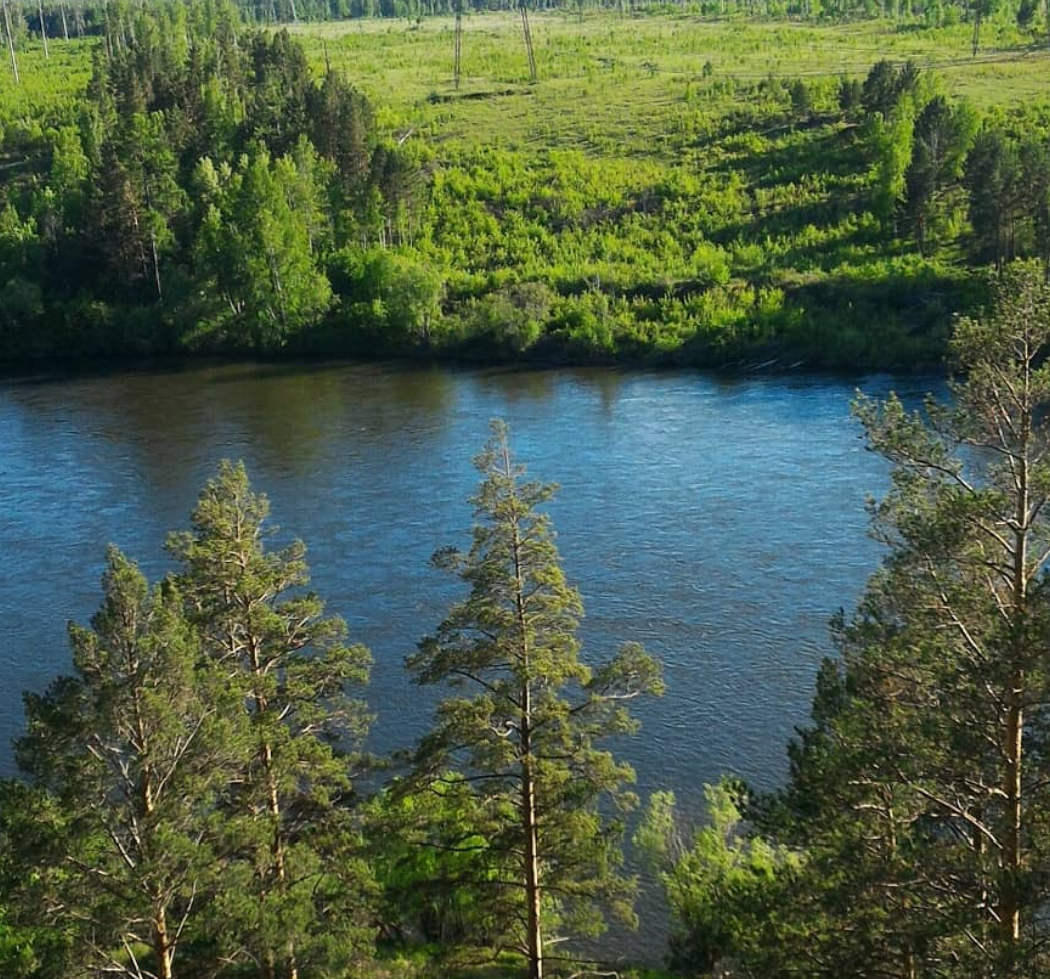 The Iya River in the vicinity of Tulun, Irkutsk Region